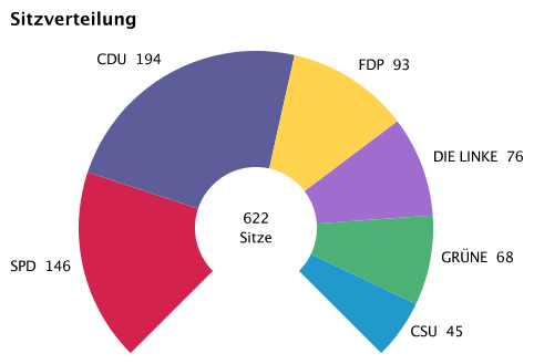 Sitze Bundestagswahl am 27. September 2009